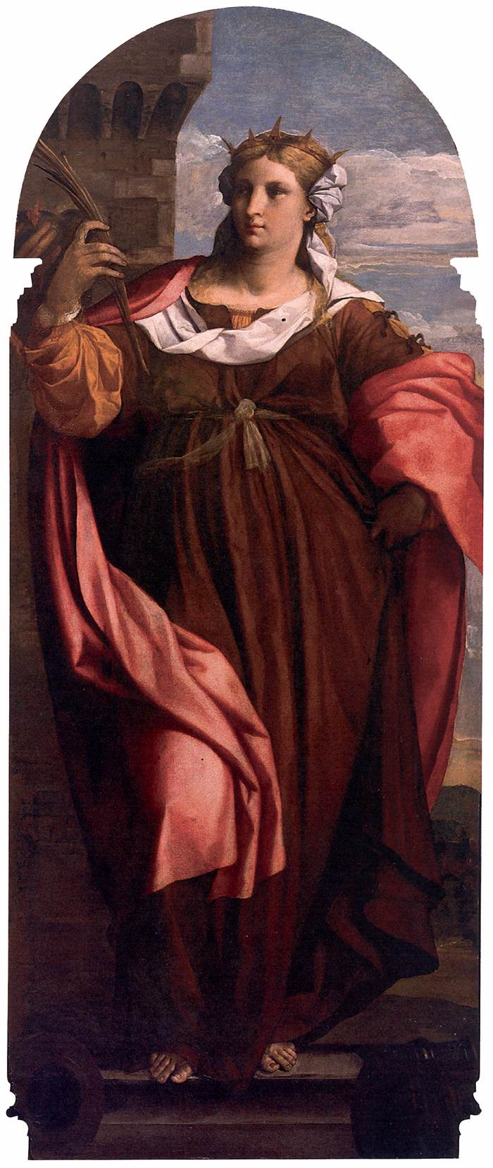 central panel